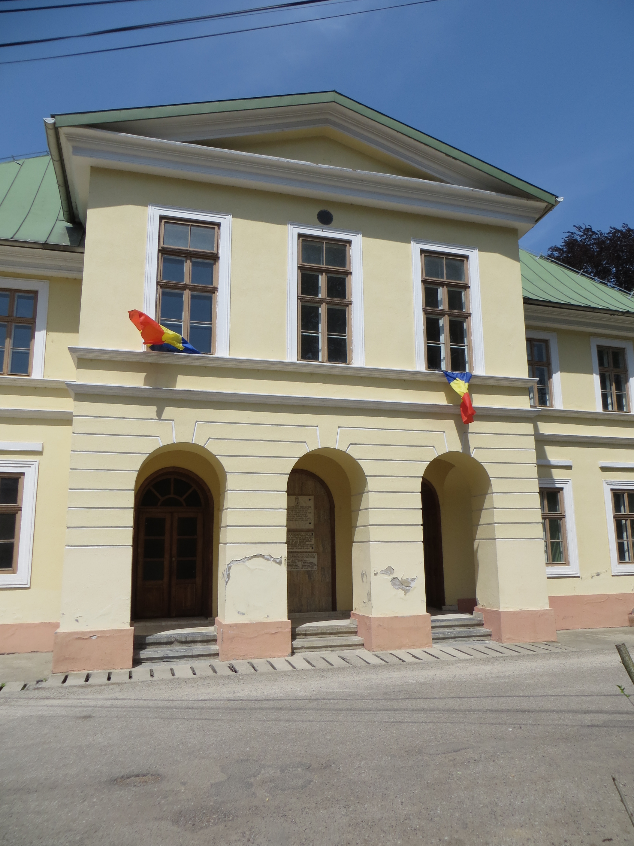 Teatrul vechi, azi Teatrul "Mihai Eminescu", a fost primul teatru românesc apărut, în 1817